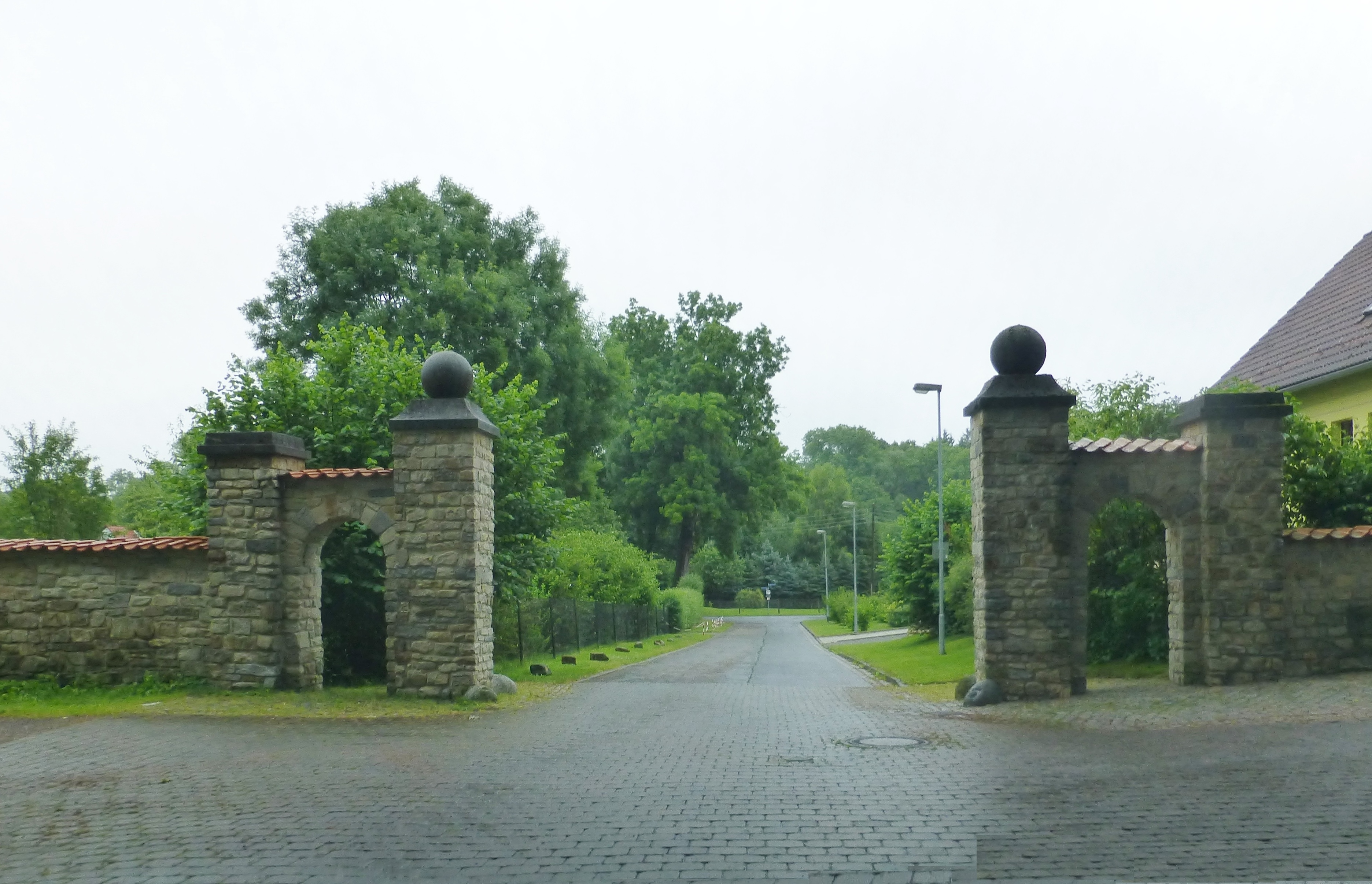 Eingangstot zum Kloster Beuren, dieses befand sich ursprünglich am westlichen Abschluss des Klostergeländes)